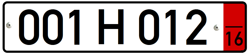 پلاک ماشین در جمهوری بلغارستان